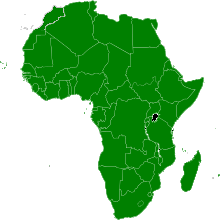 دول الإتحاد الأفريقي